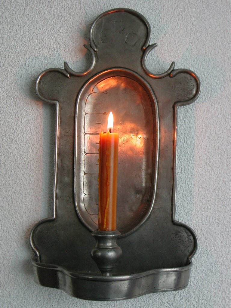 Candle clock, Kerzenuhr